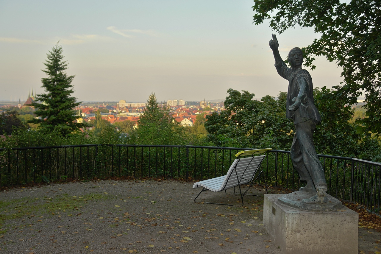 egapark Erfurt Buchenwaldblick